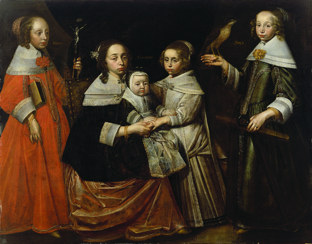 Allegorische familieportret (Fides, Caritas, Spes)